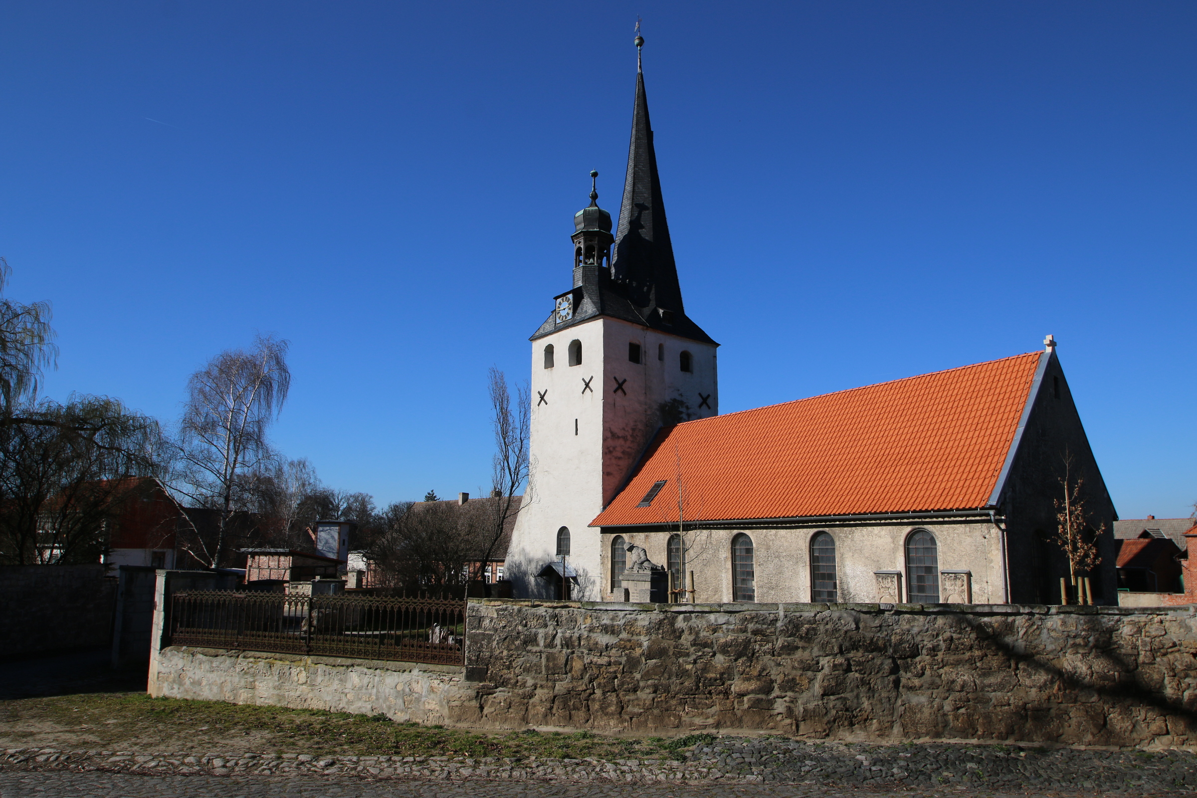 Dorfkirche in Anderbeck / Huy